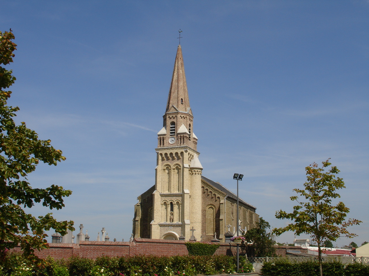 Église de Coulogne